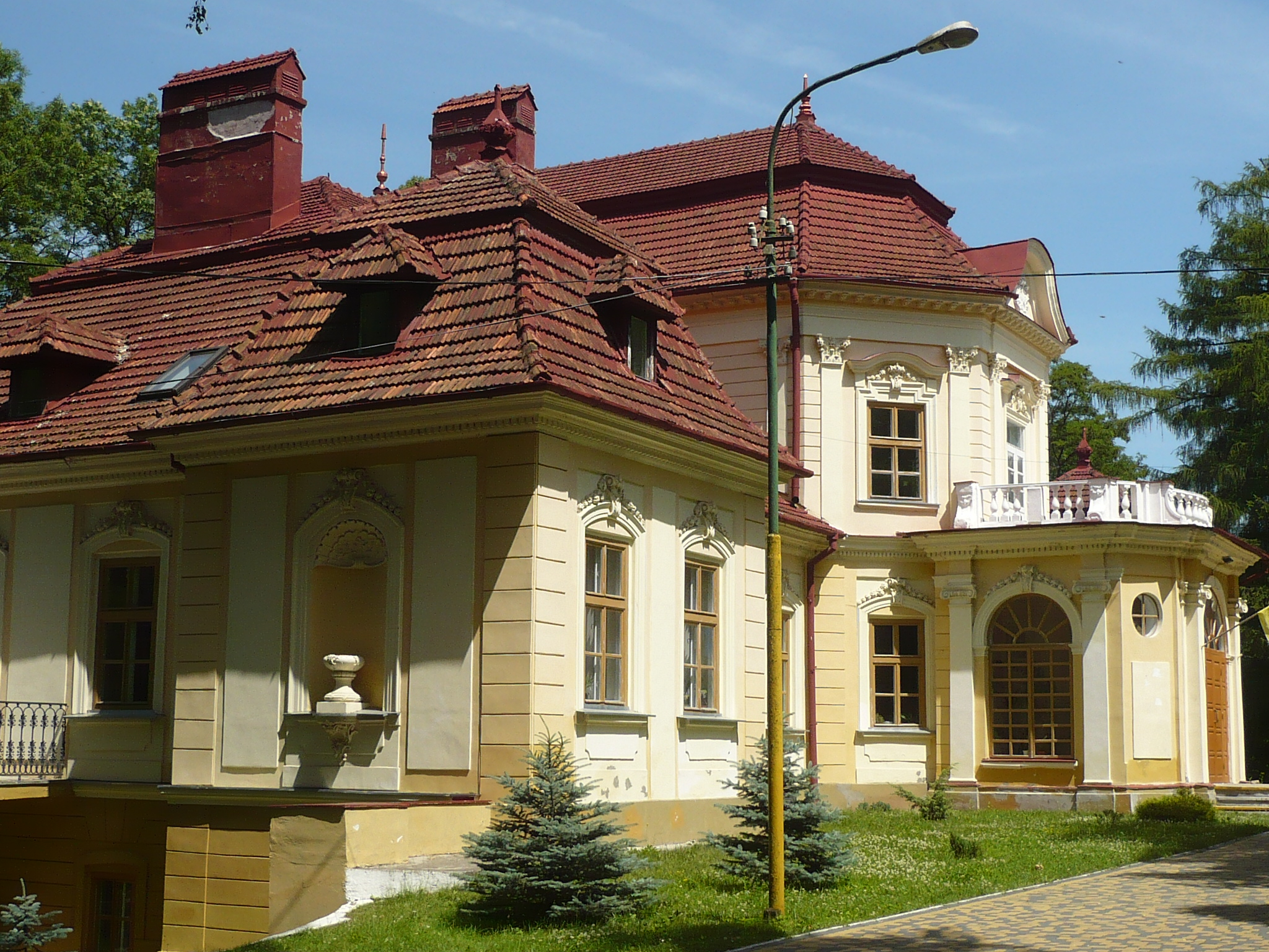 Pałac. Lubień Wielki